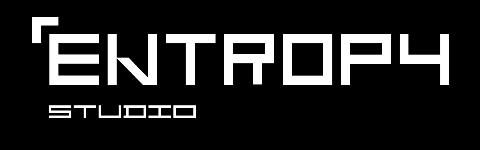 Entropy Studio Logo